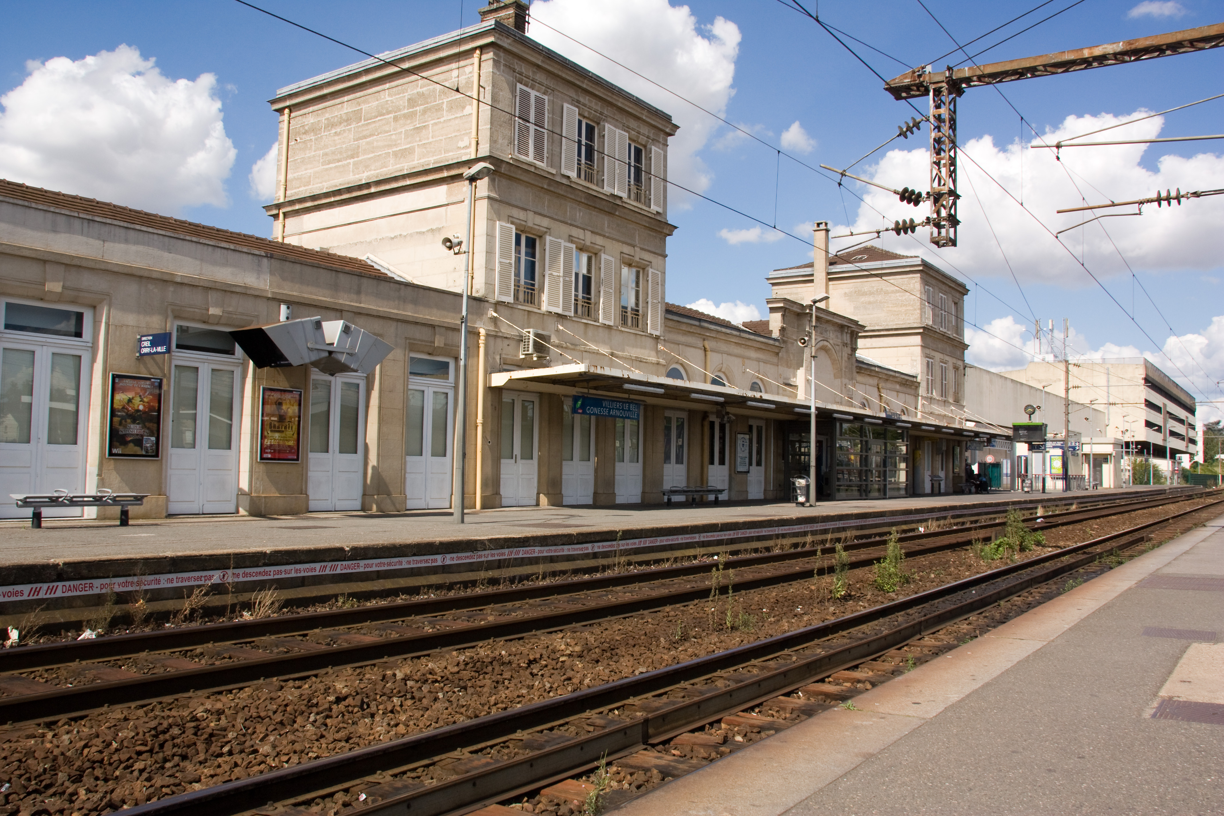 La Gare de Villiers-le-Bel - Gonesse - Arnouville, département du Val-d'Oise, France